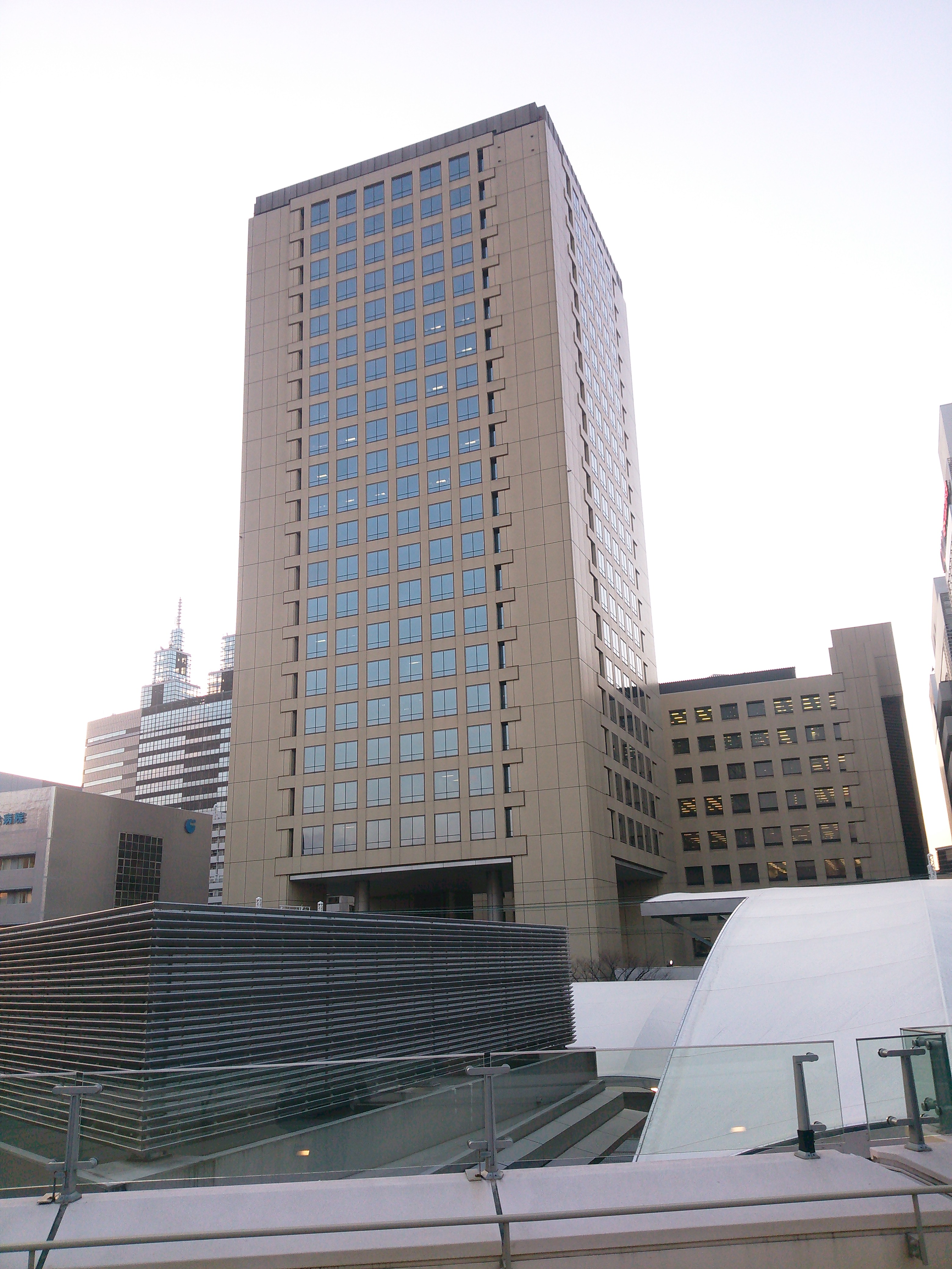 神奈川県川崎市川崎区日進町、興和川崎東口ビル